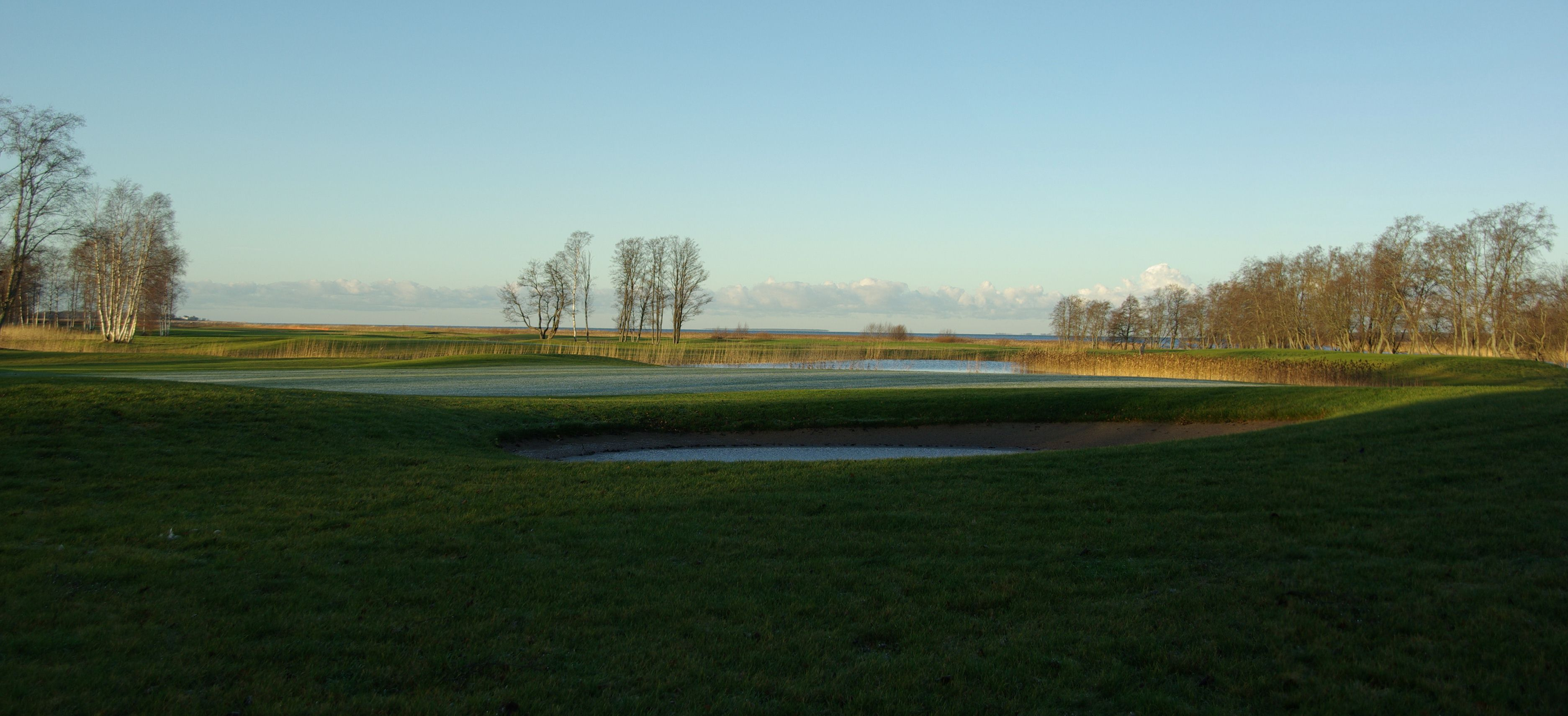 Küla asetseb Rebala Muinsuskaitsealal, kolmel nõlval, Ihasalu lahe ääres ning Jägala jõe suudmes. Esimest korda mainiti Manniva küla 17. sajandi teisel poolel. Pärast katku jäi küla tühjaks. Esimesed uued asukad tulid Mõdriku vallast ja neli talu said nime perepoegade järgi: Pärtli, Mardi, Jüri ja Siimu. Viies talu, milles elasid vanad, sai nimeks Vanumäe. Talud olid väikesed ja elatist teeniti kalapüügiga ja põllumajandusega. Külas on olnud ka paadisadam. Manniva külas on ka golfiväljakud.